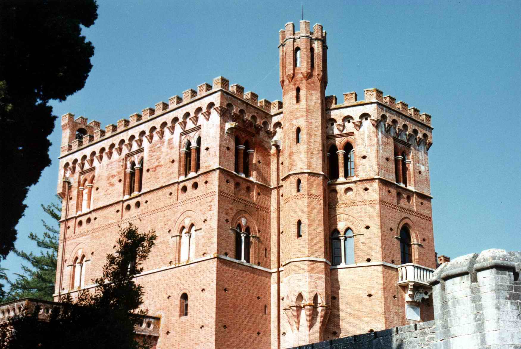 Gaiole in Chianti (Siena-Italia): il castello di Brolio